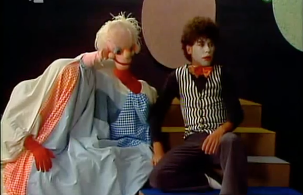 Ratafak plachta a jeho dobrý priateľ Valentín